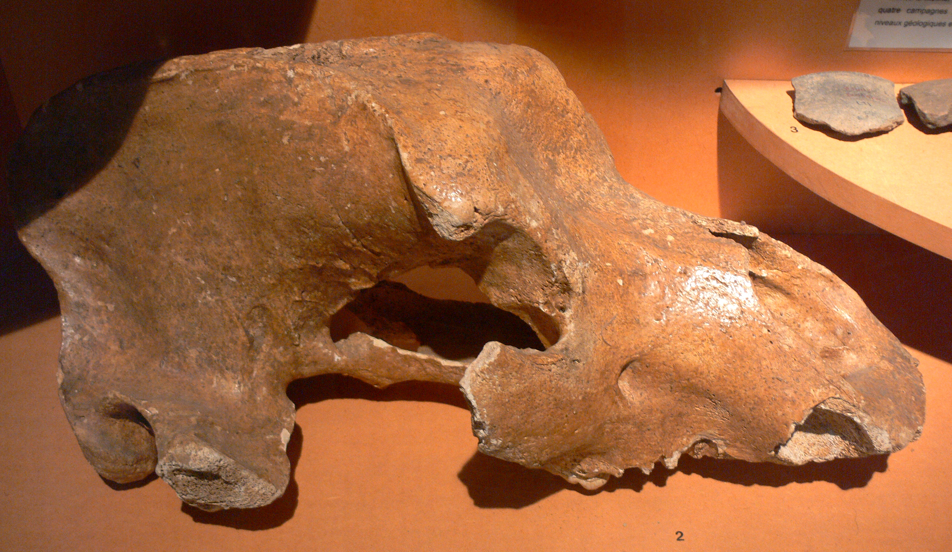 Crâne d'ours des cavernes. Grotte de la Baume (Echenoz-la-Méline, Haute-Saône). Vesoul, musée Georges-Garret.